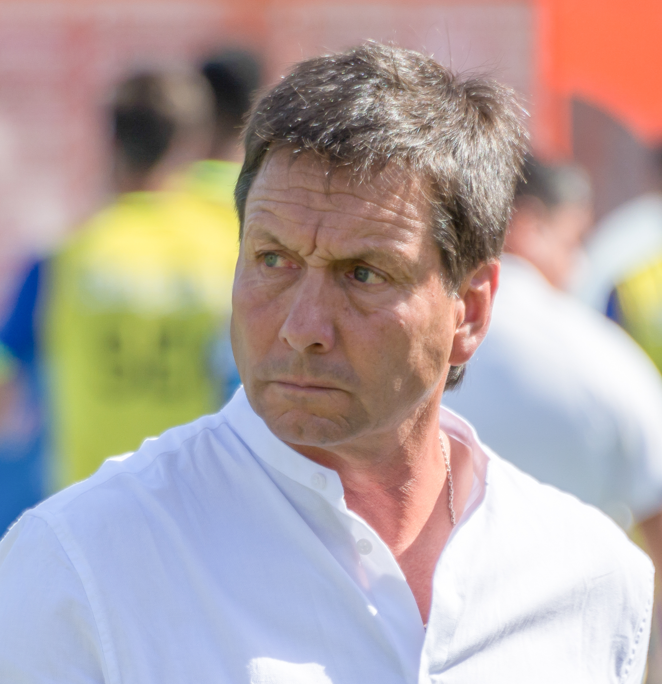 Fernando Díaz, Universidad de Chile v Unión Española, Estadio Nacional Julio Martínez Prádanos, Ñuñoa, Santiago, Región Metropolitana, Chile.